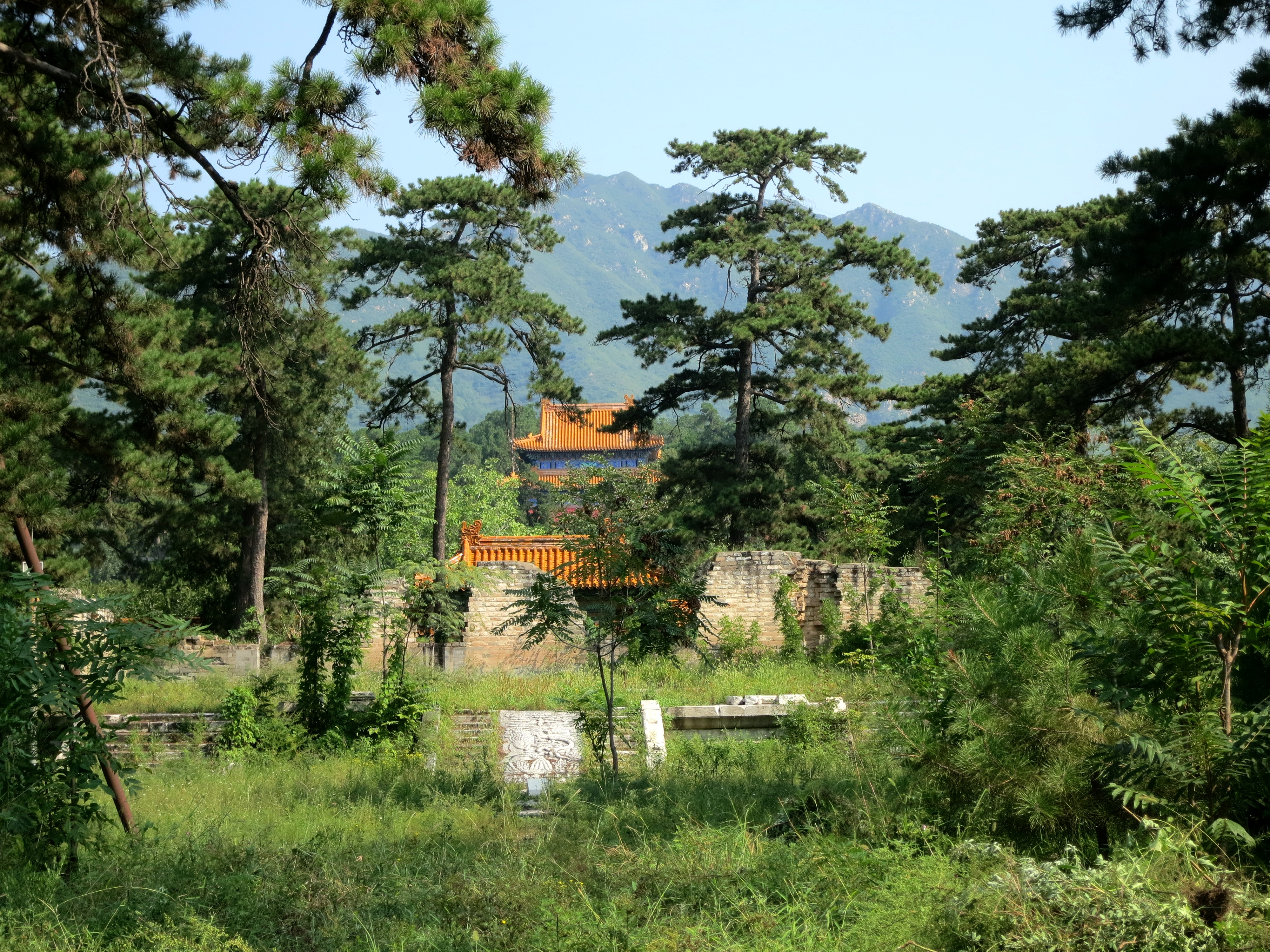 明庆陵 - Qingling Tomb - 2015.08